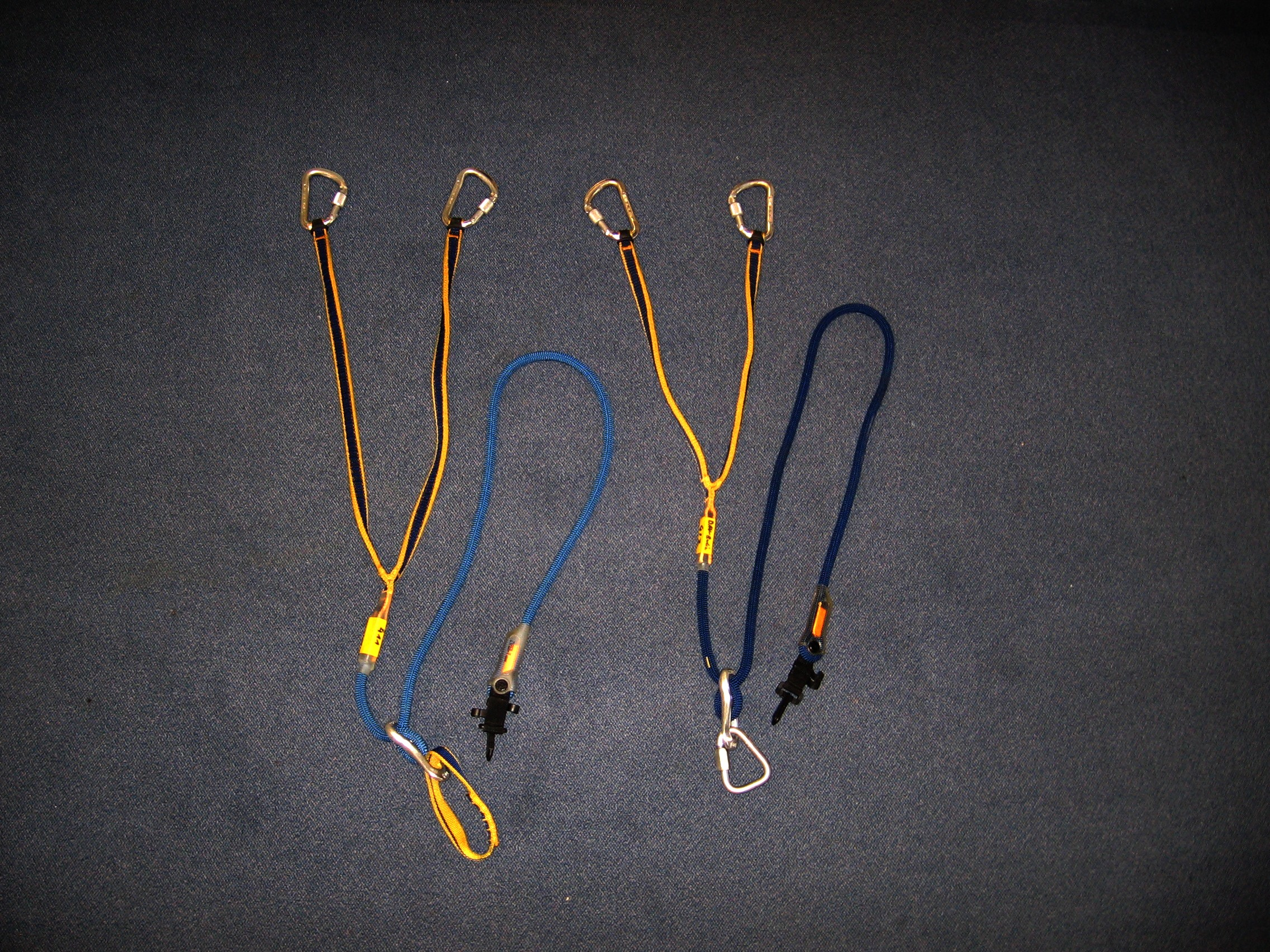 Moderne Klettersteigsets, links mit genähter Einbindeschlaufe, rechts mit Stahlkarabinerhaken